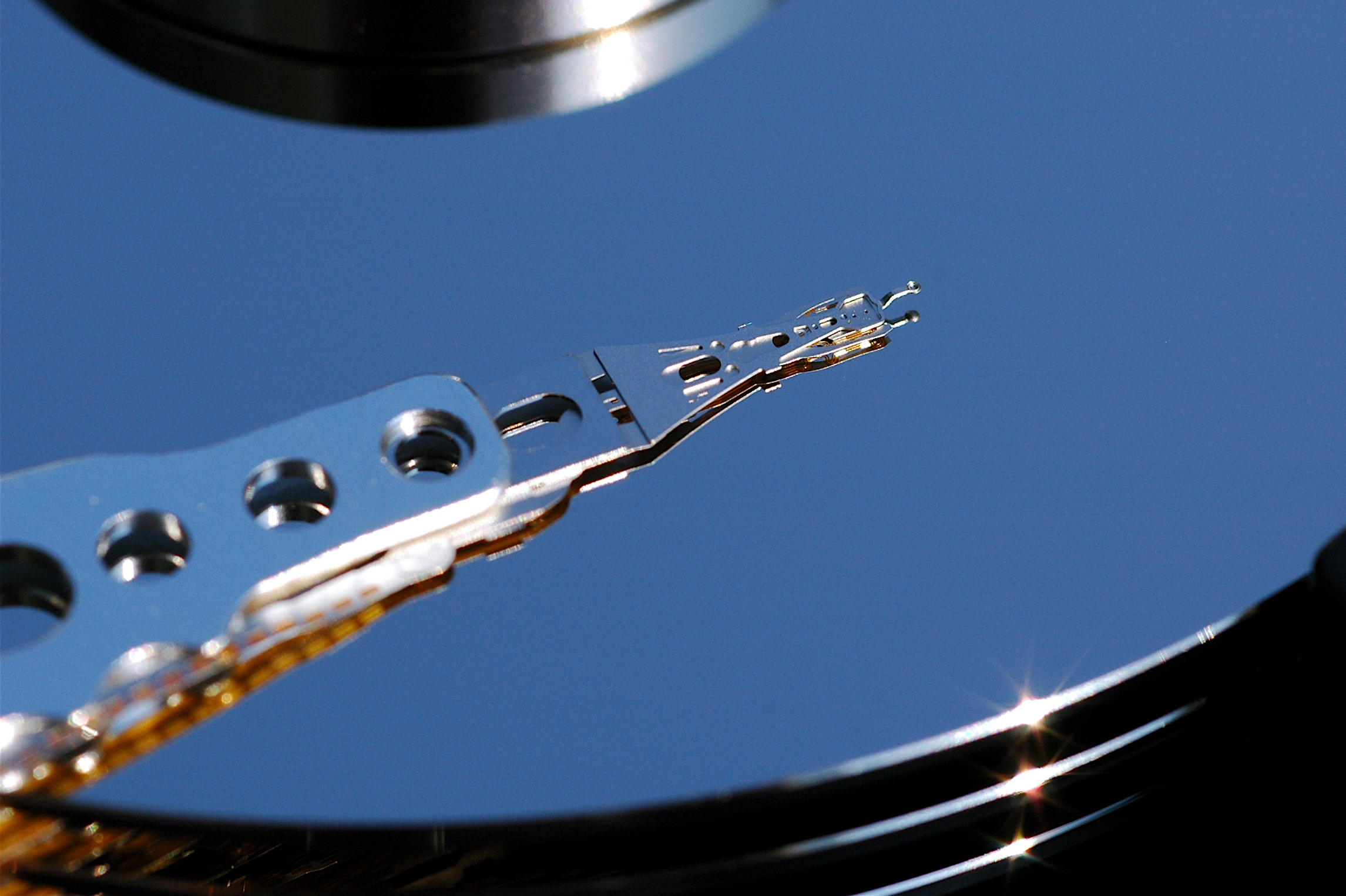 Detailní pohled na hlavu pevného disku